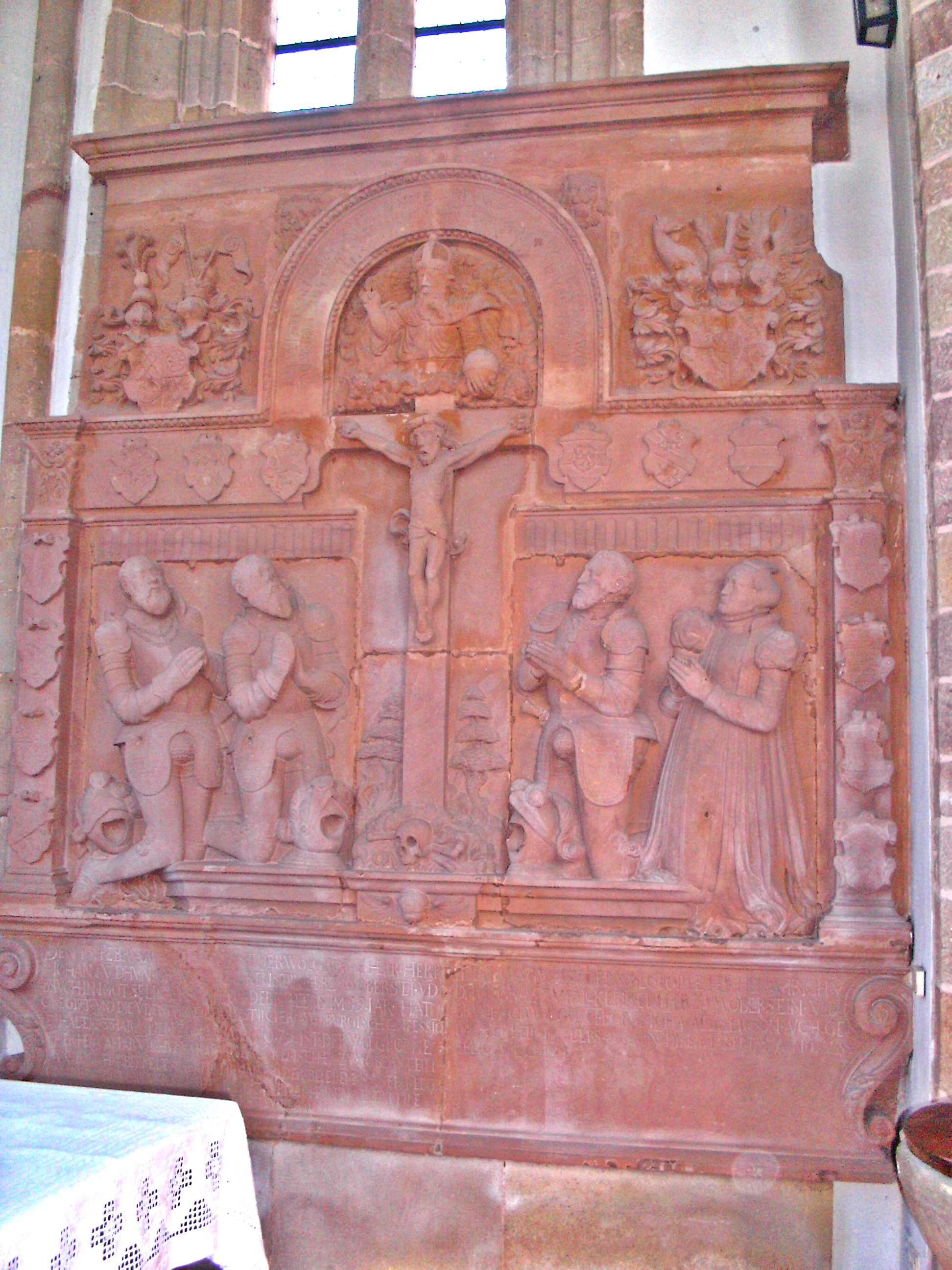 Grab der Grafen von Daun-Falkenstein in der ehem. Klosterkirche